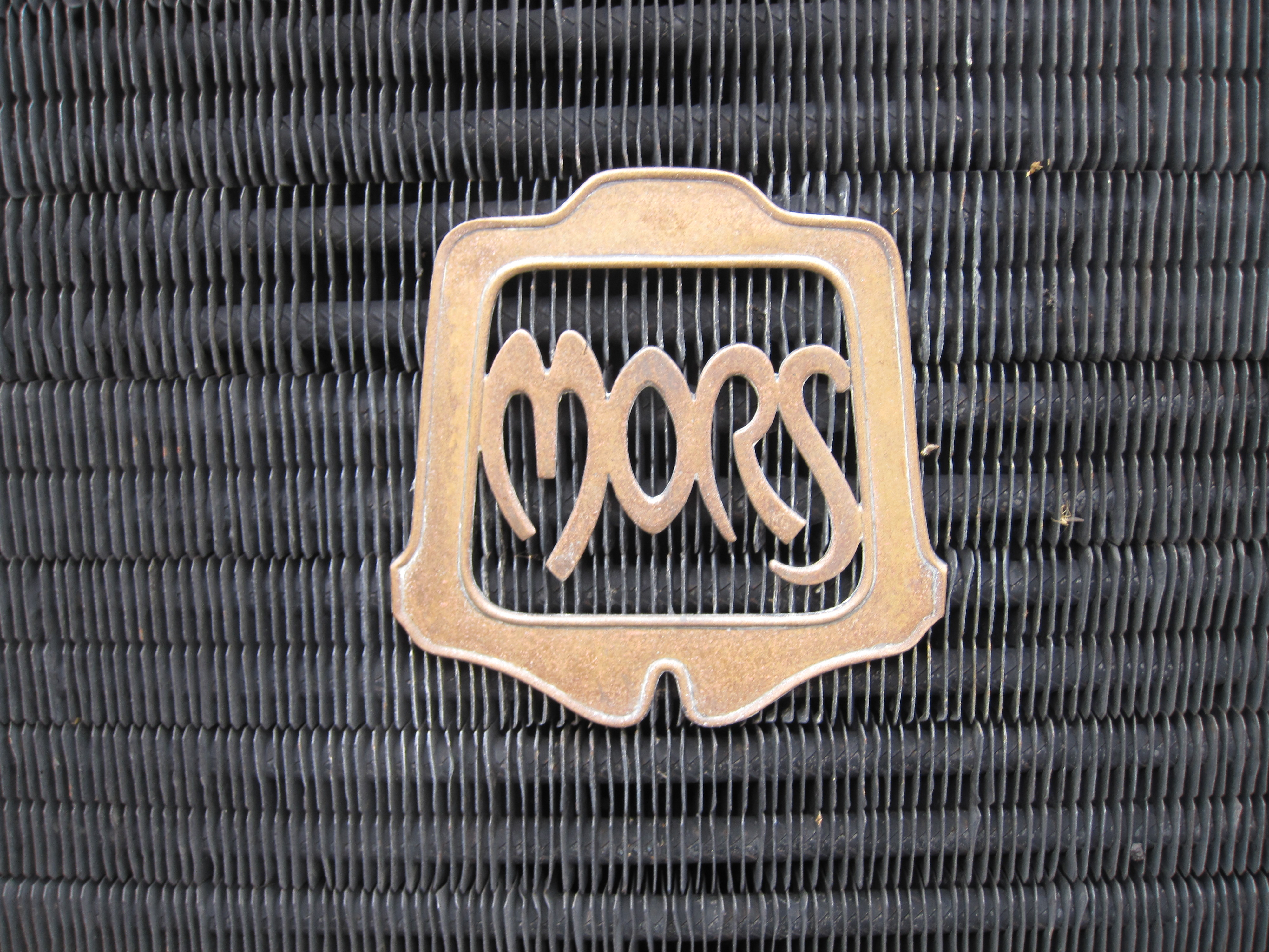 1913 Mors 12/15 (DVLA) made 1913, 2116 cc